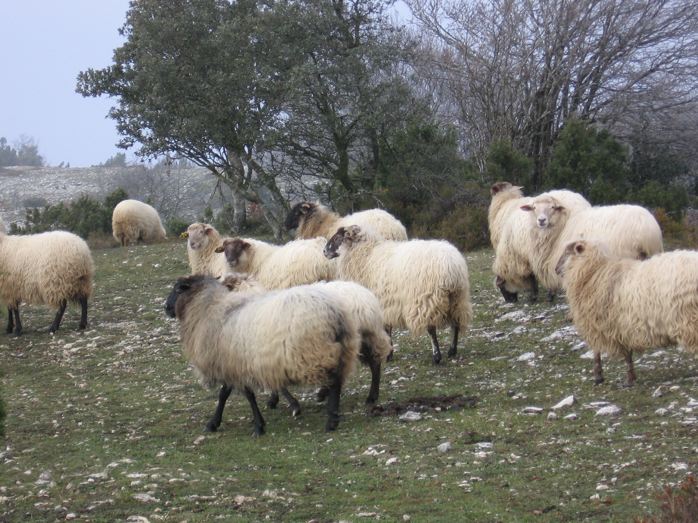 Ovejas Latxa en los Montes de Vitoria